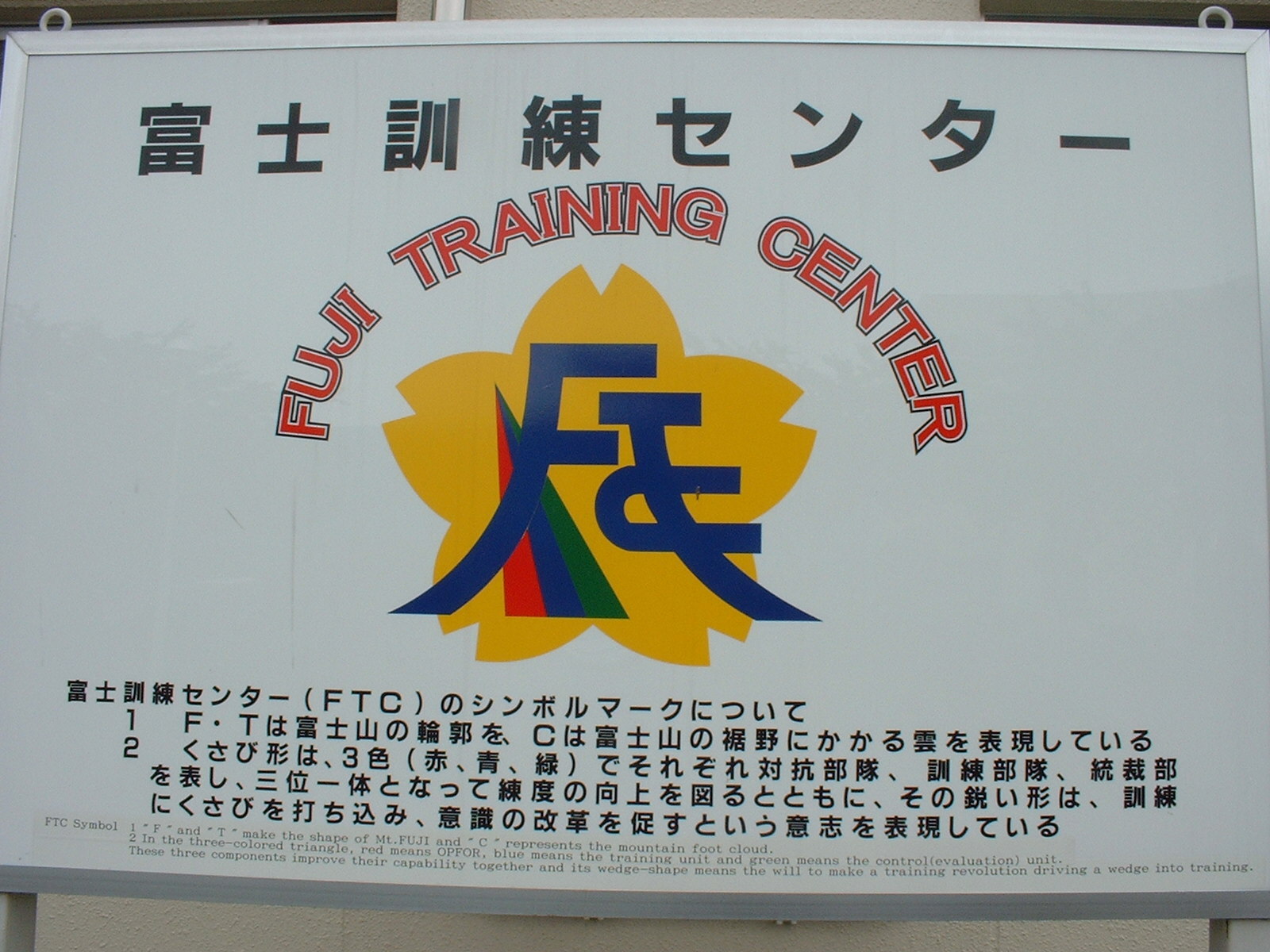 権利者：本人（撮影者より公的使用権利を譲渡）